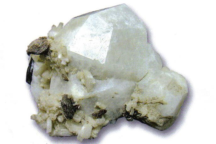 Fotografía del mineral Analcima, de fórmula química Na(AlSi2O6)·H2O.